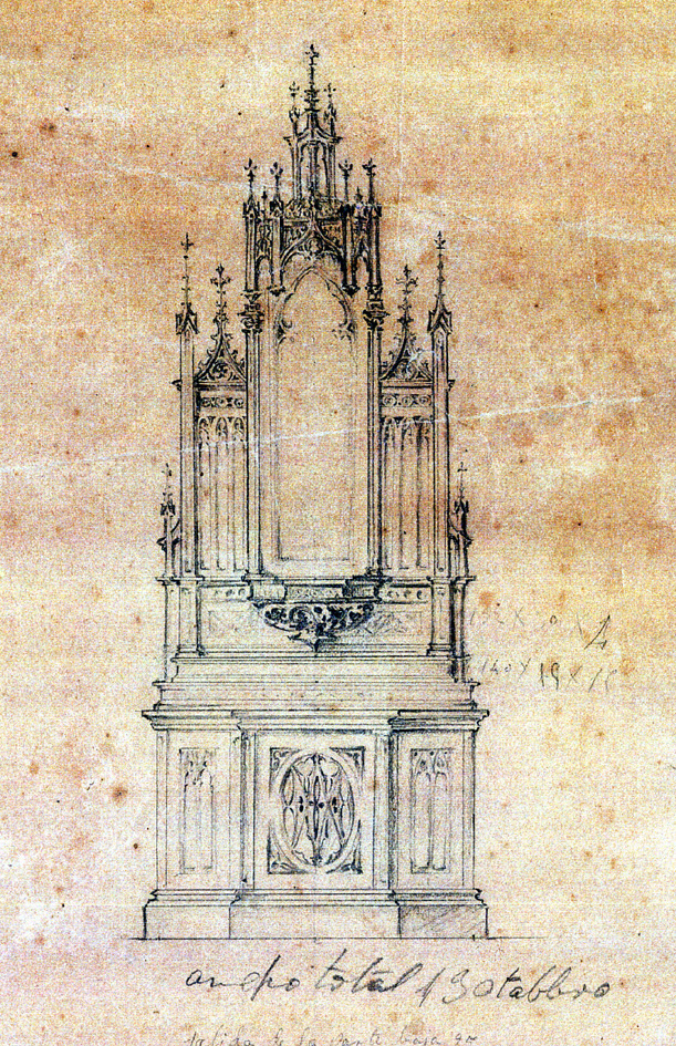 Boceto para Altar. Anastasio Martínez Hernández.